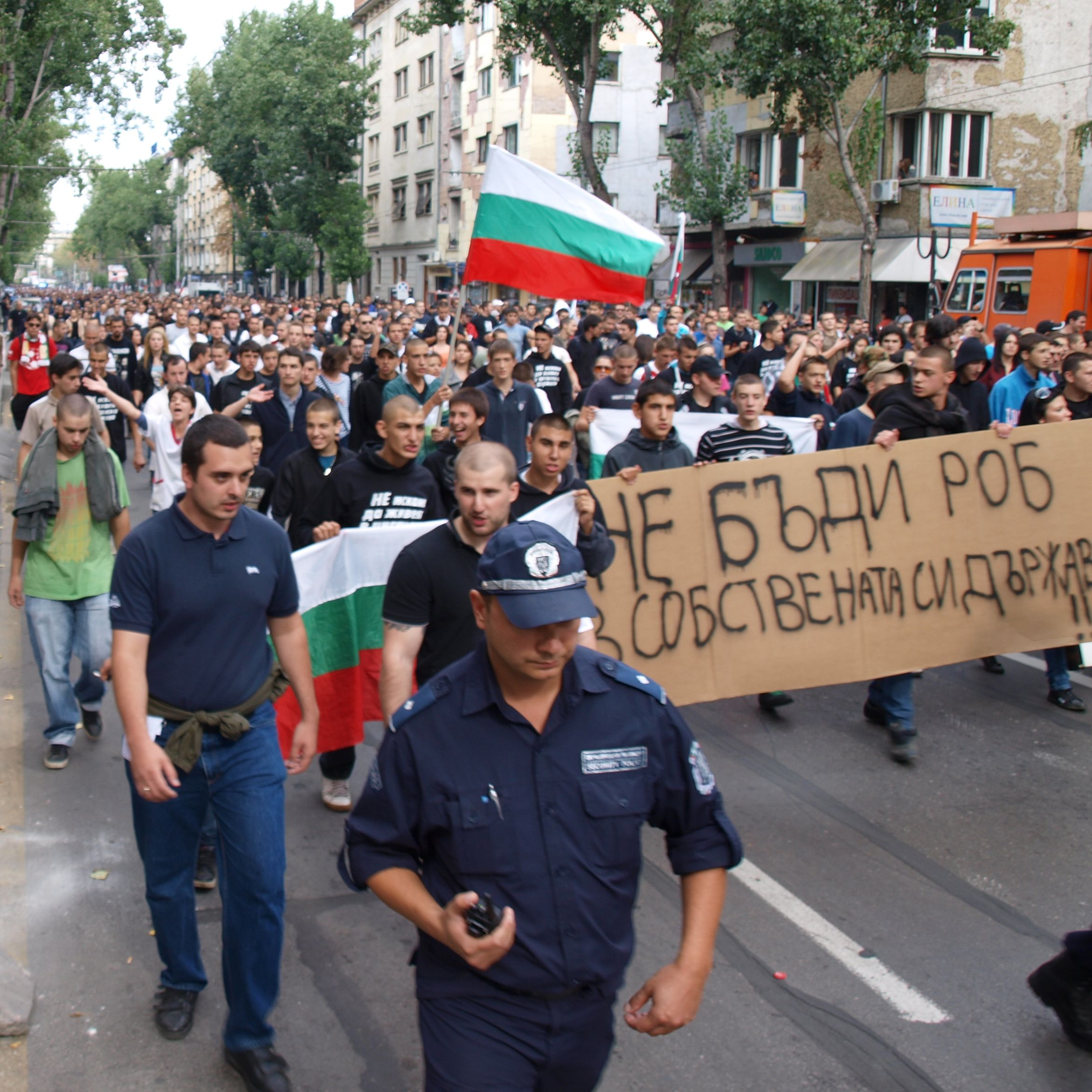 Протест срещу циганската престъпност в София.